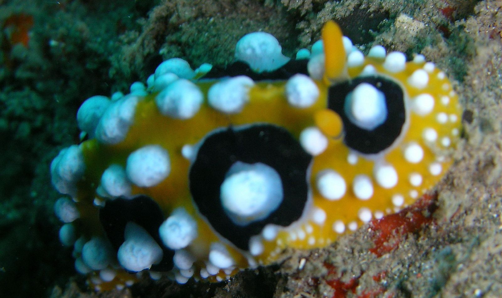 Phyllidia ocellata